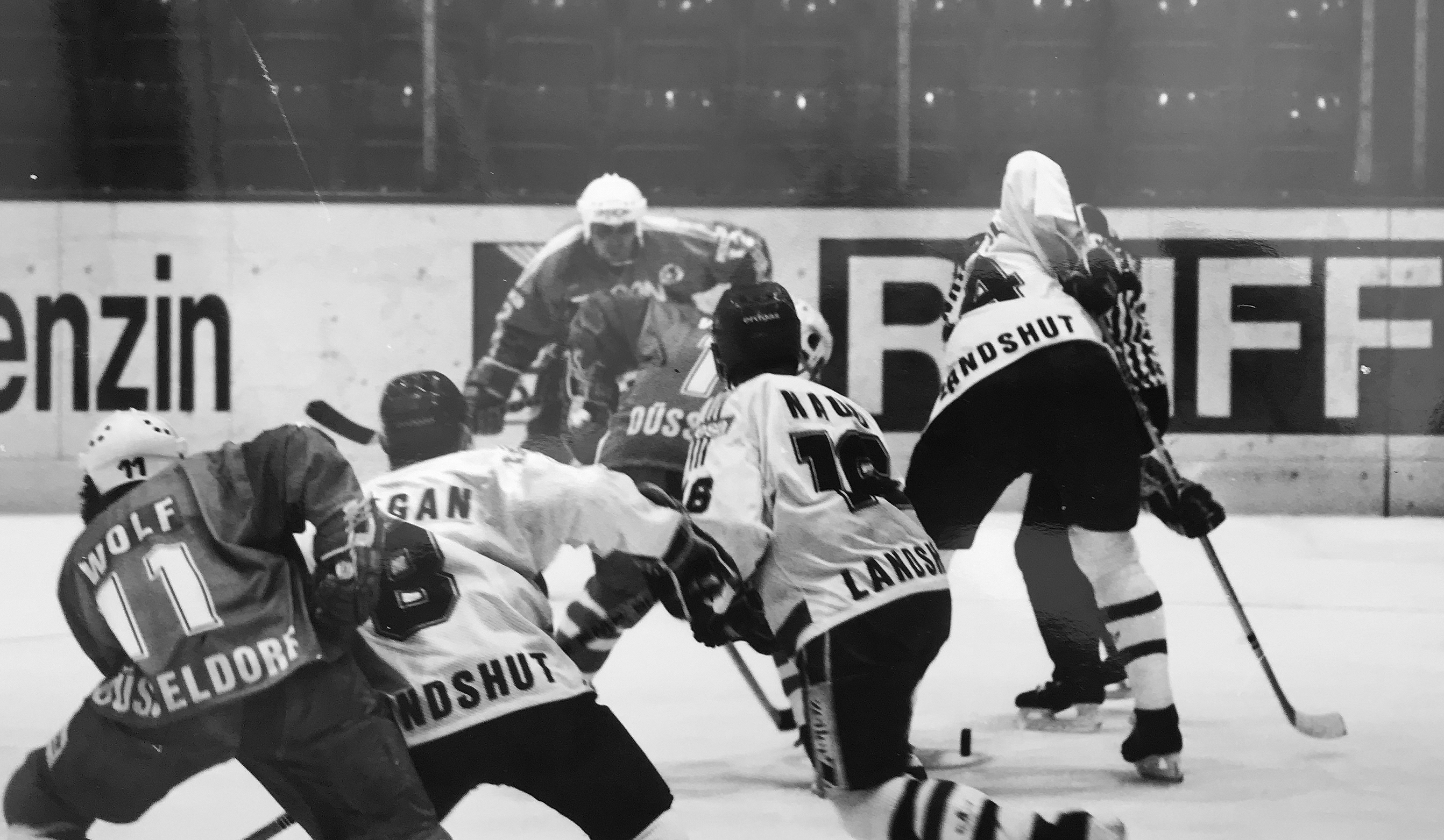 Erich Kühnhackl, Center EV Landshut, Bild aus Saison 1988/89 während eines Heimspiel gegen DEG (Düsseldorf). - Abfotografiert vom eigenen Original-Papierabzug.